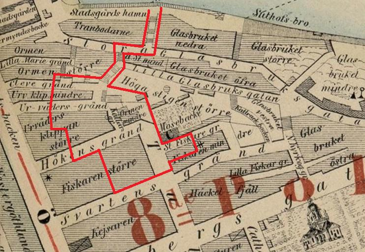 Mosebacke brand 1857, brandområdet inlagt på en karta från 1855